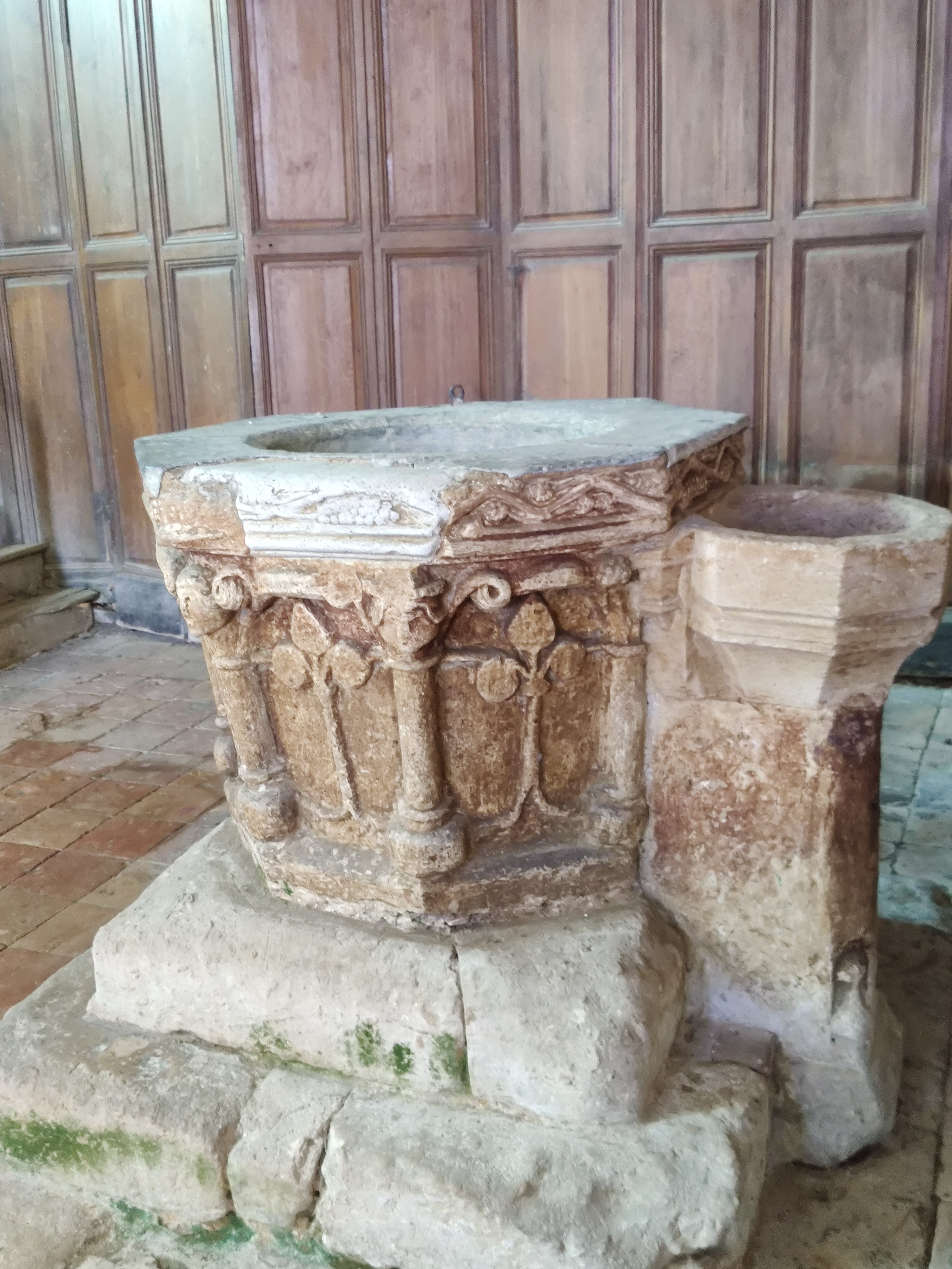 Le Hamel (Oise) : Les fonts baptismaux de l'église Notre-Dame